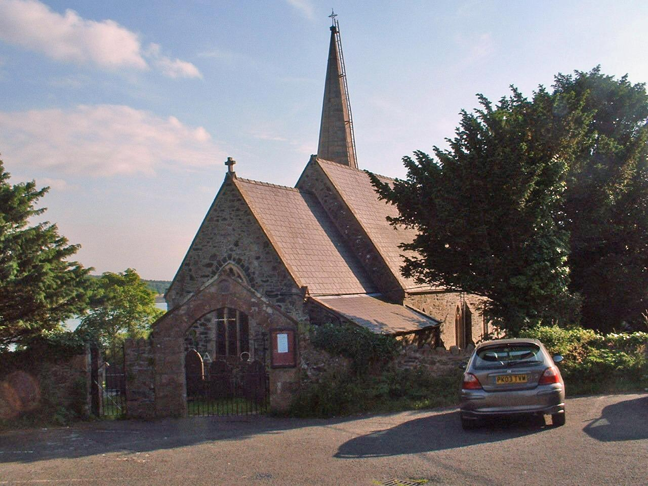 St. Mary's Church in Llanfairpwllgwyngyllgogerychwyrndrobwllllantysiliogogogoch, Anglesey, Wales.